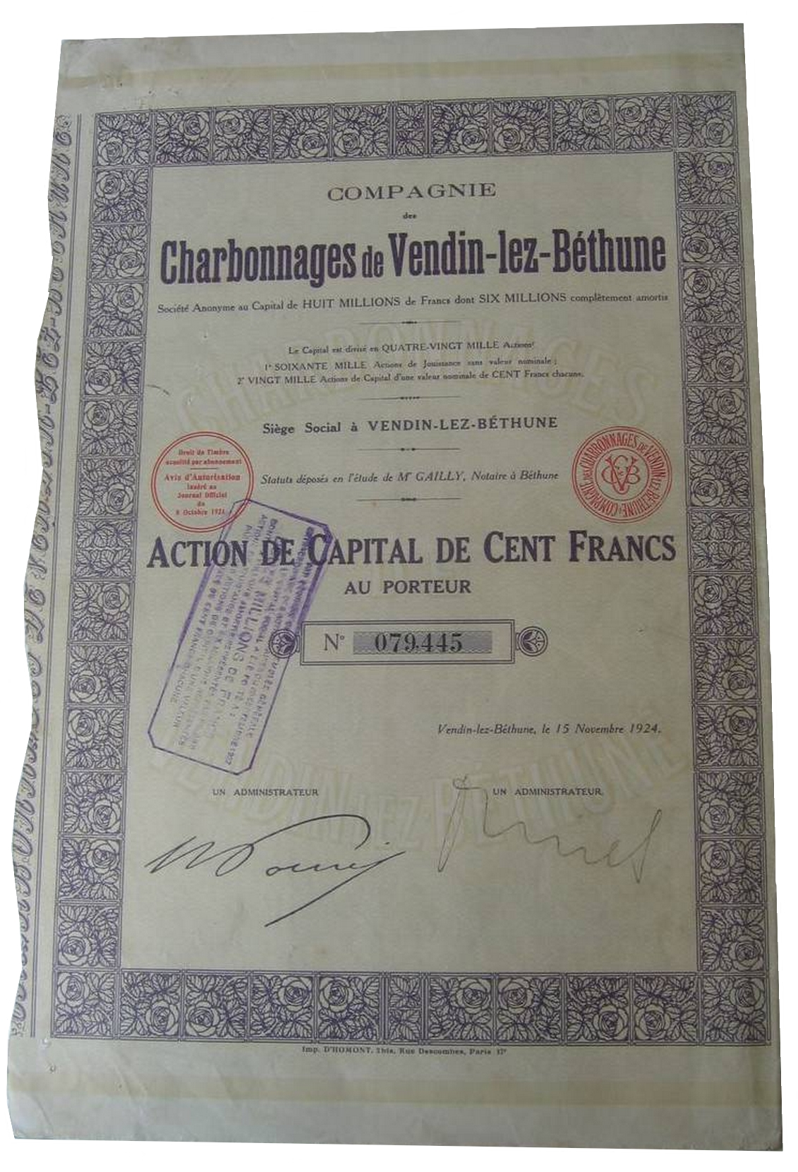 Action de la Compagnie des Charbonnages de Vendin-lez-Béthune de 1924.